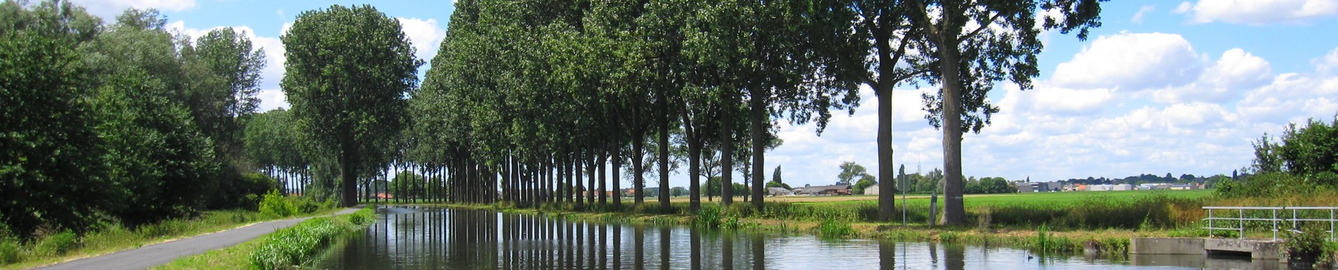 L'ancien village de Warcoing